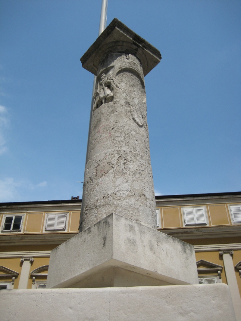 Stendarac (stup za zastavu) pred zgradom riječkog Municipija. Rijeka, Croatia